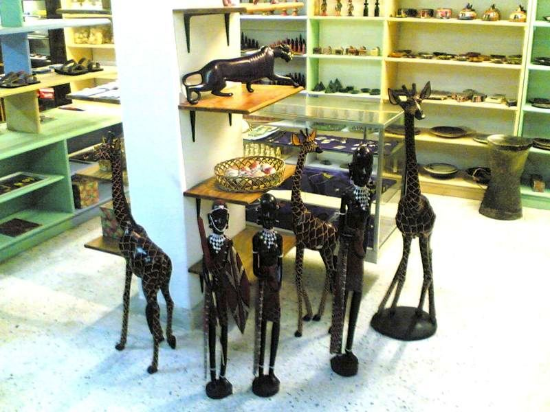 Wood Carvings in Mombasa, Kenya.